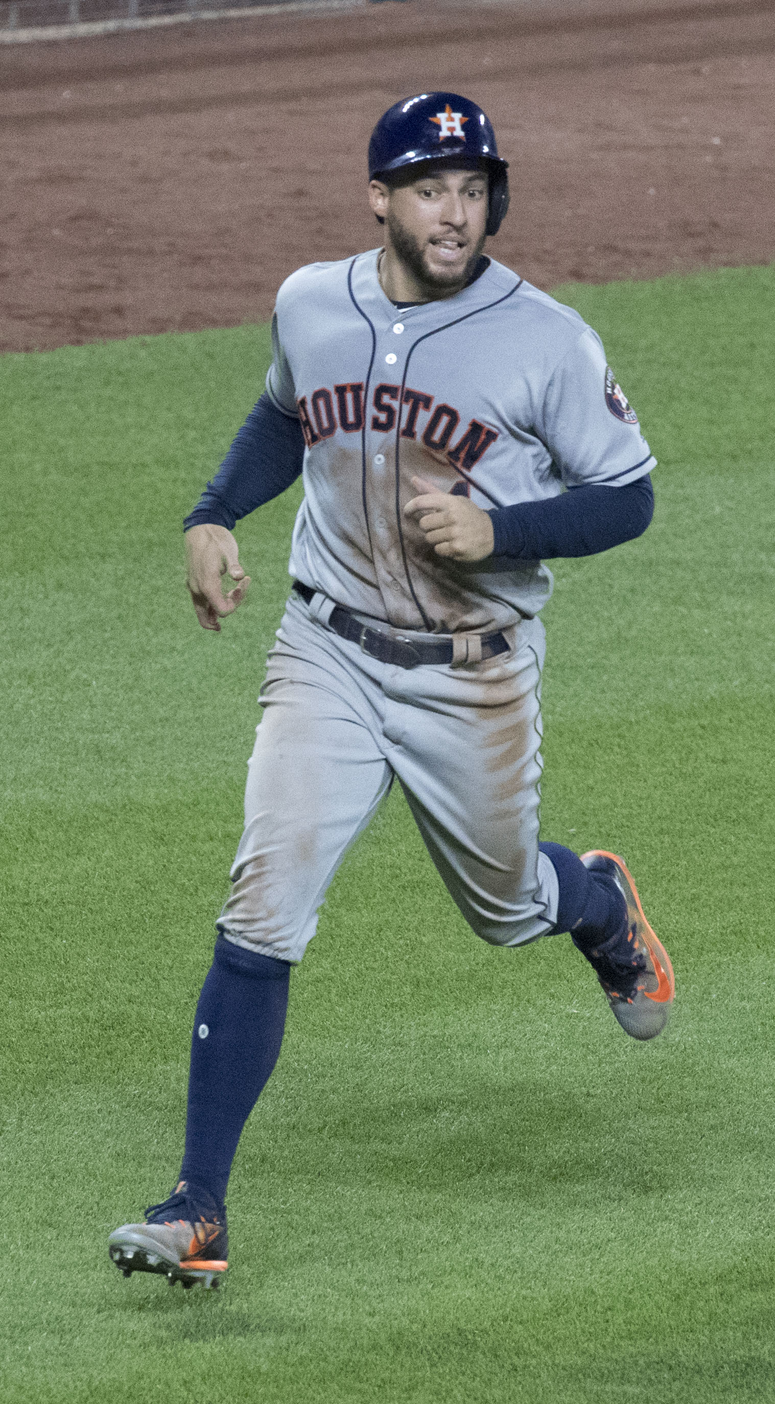 Astros at Orioles 7/21/17